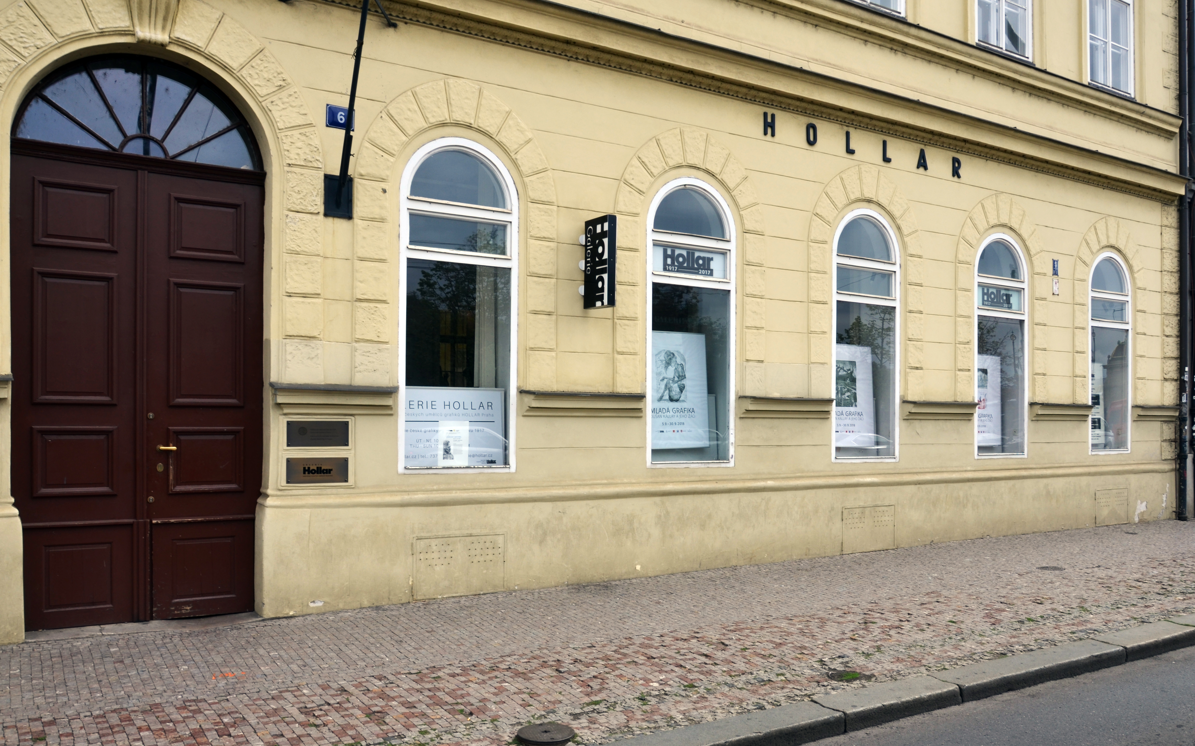 Galerie Hollar, Smetanovo nábřeží 6, Praha 1